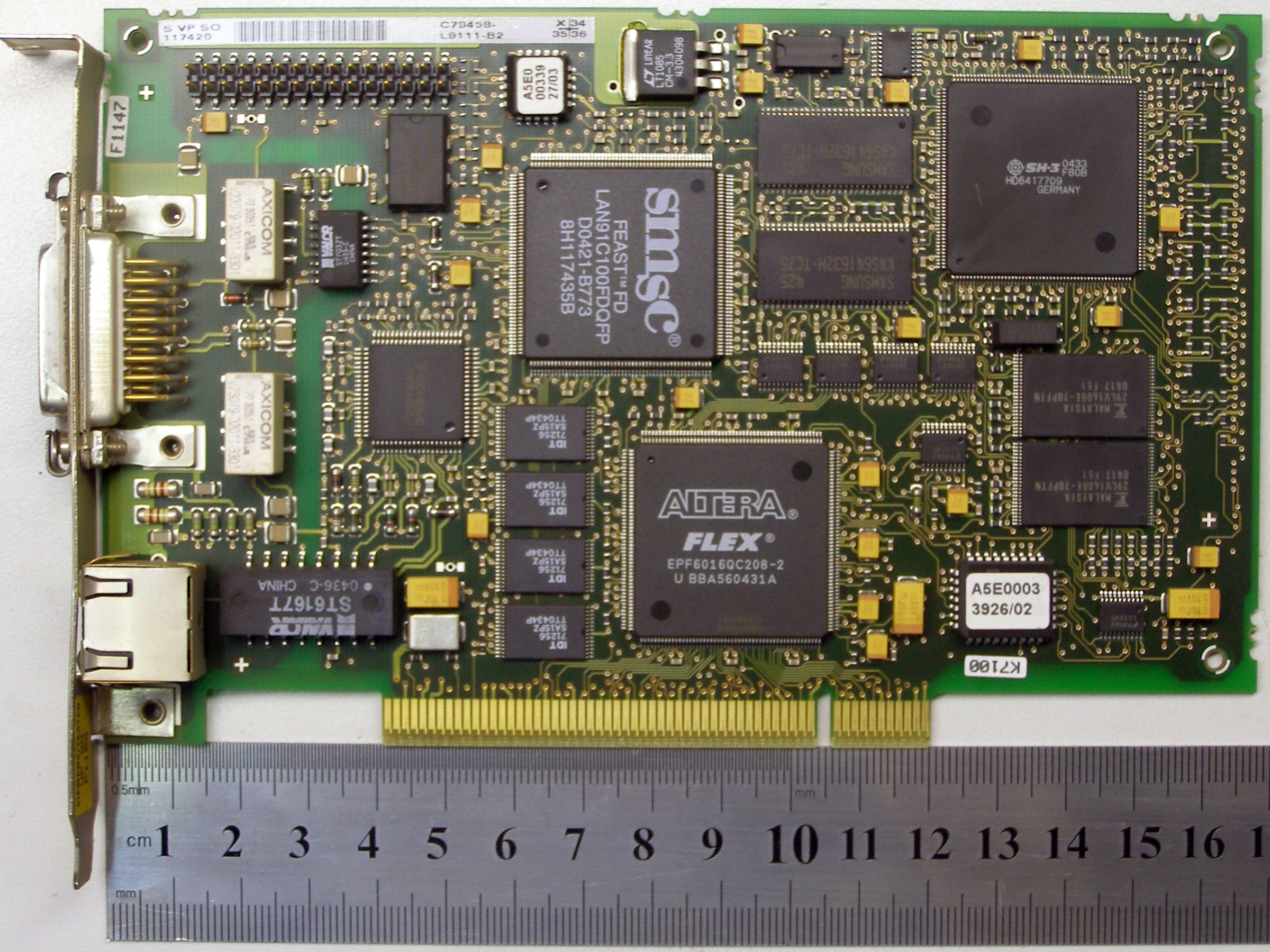 Плата IPC для организации сетевого взаимодействия с интерфейсом MPI.